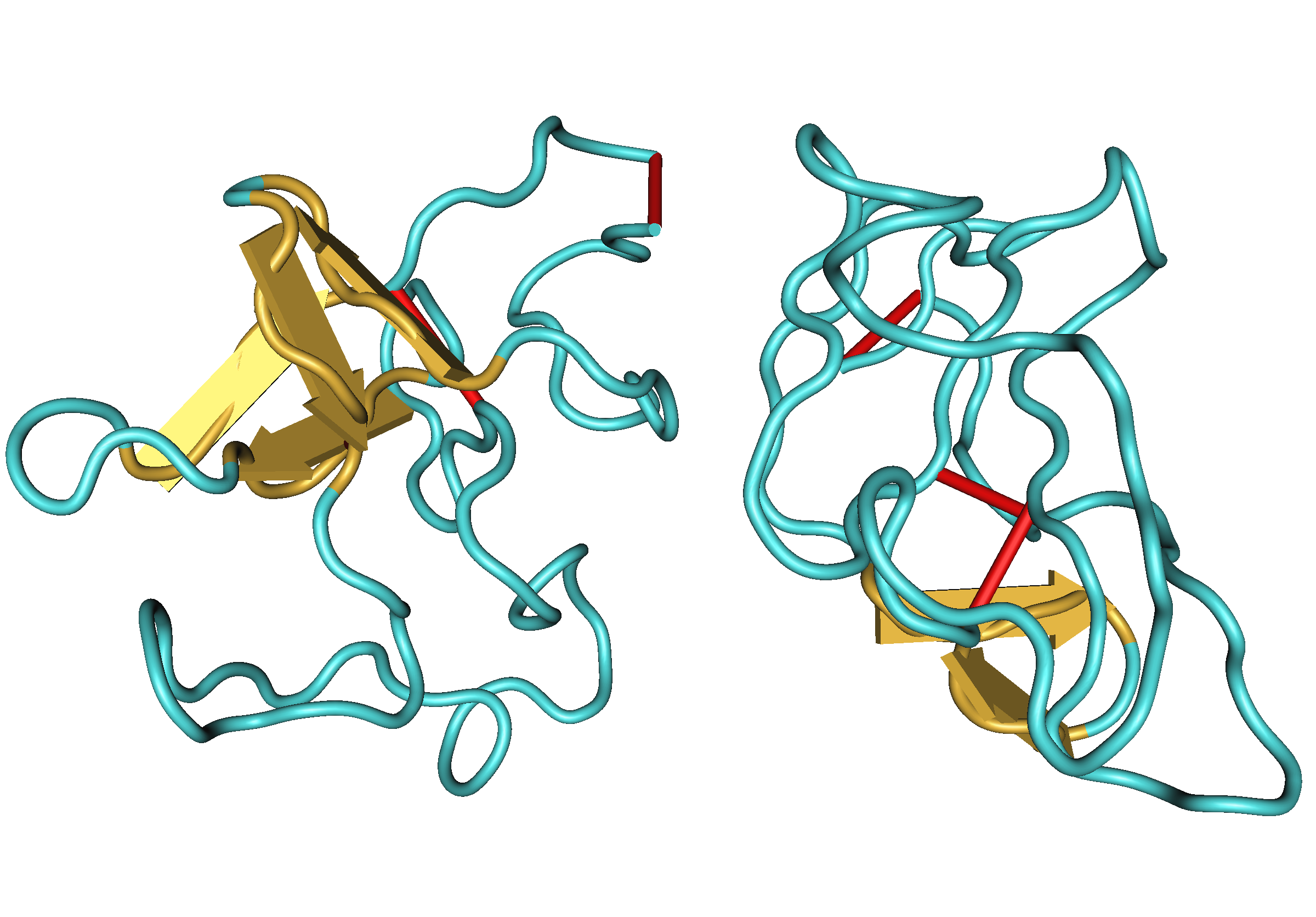 1PMK Plasminogen Kringle 4